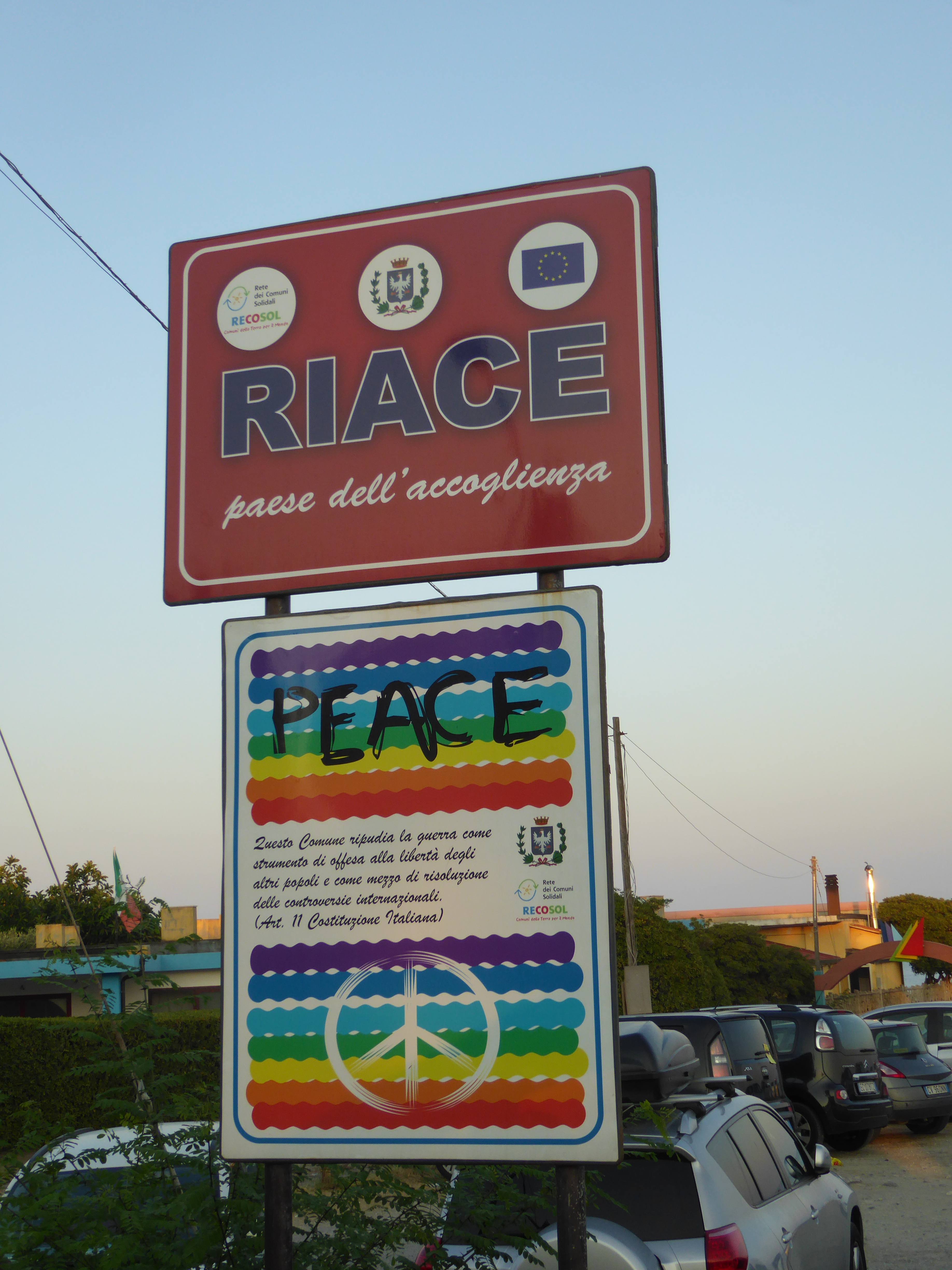 Insegna cartello Riace alla marina 2018